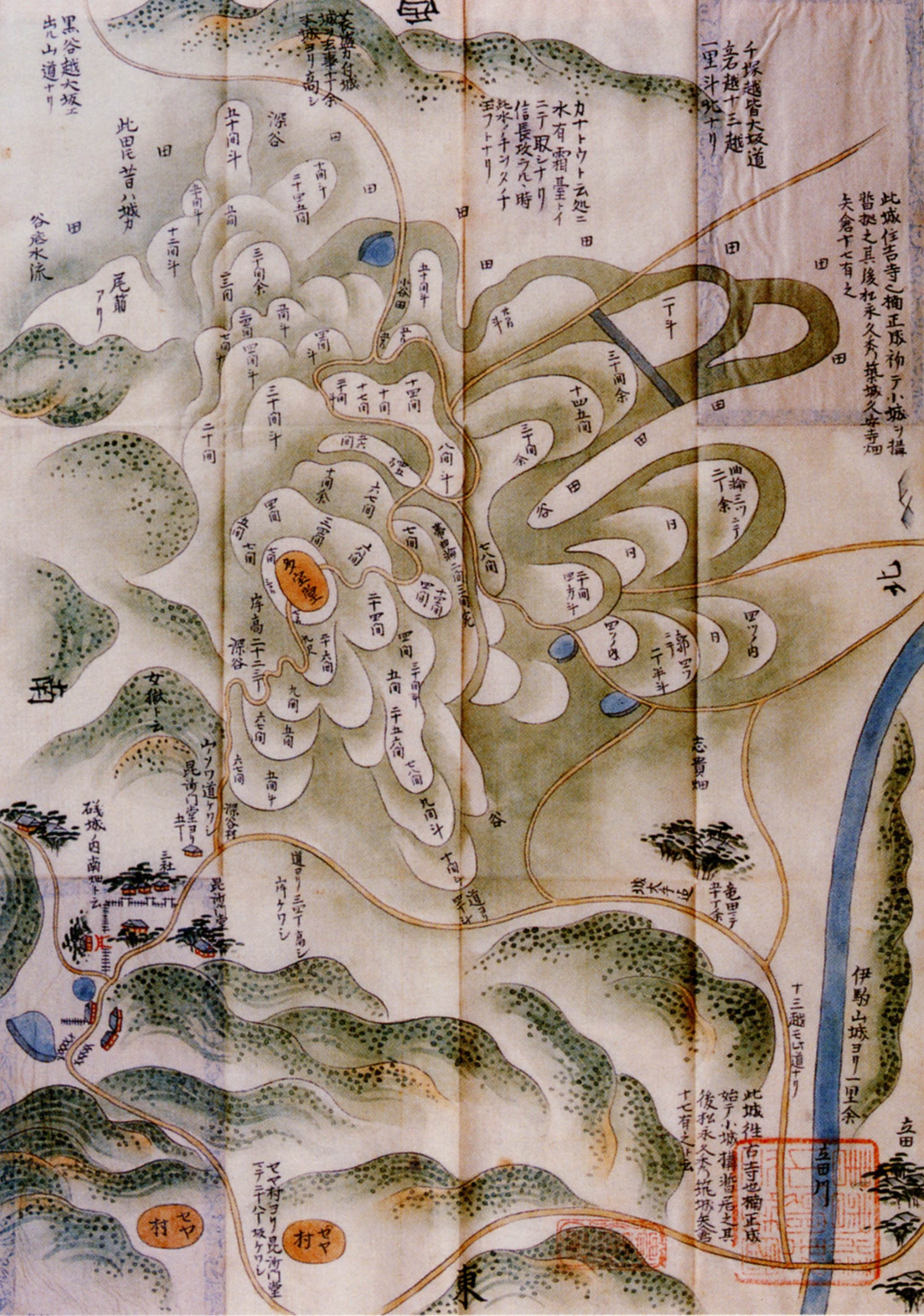 磯城